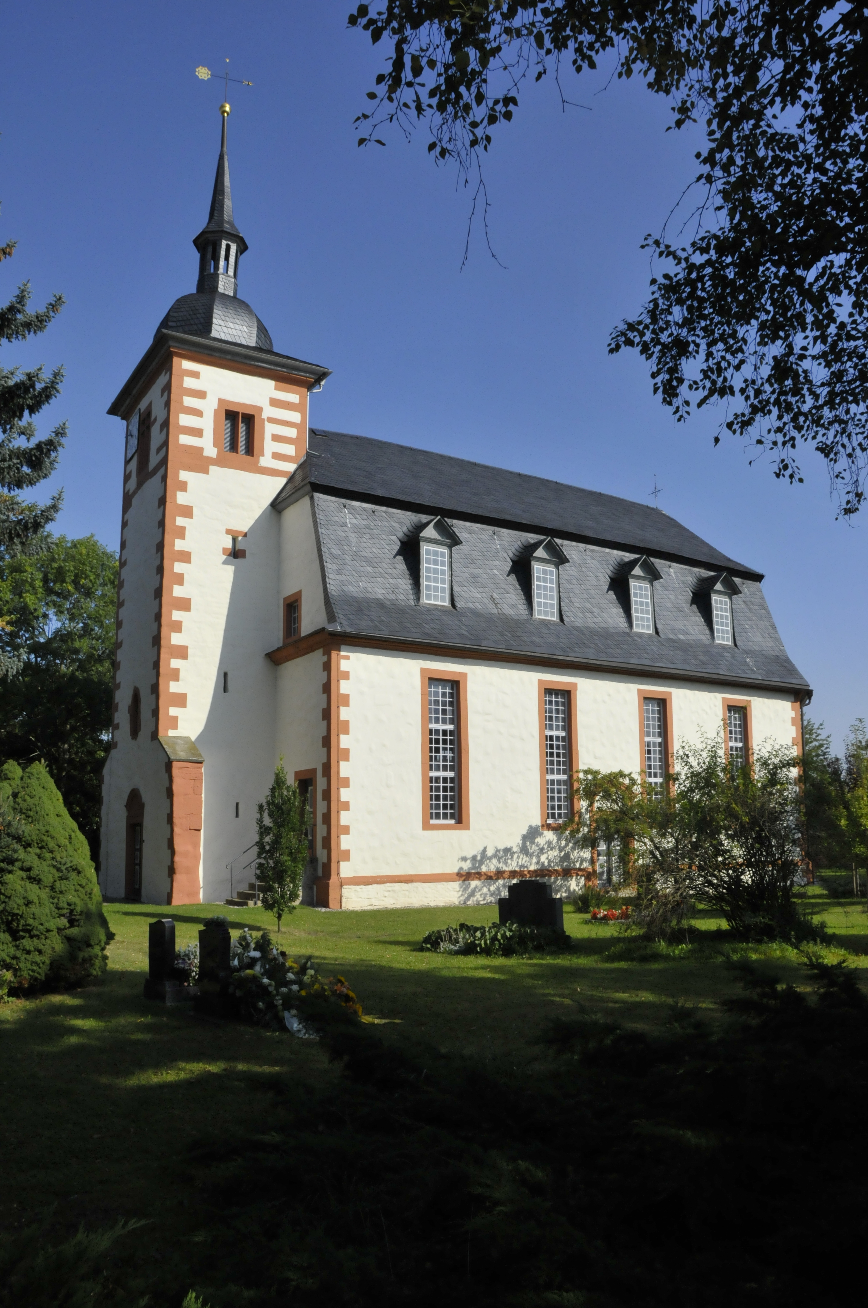 Zimmernsupra, Kirche